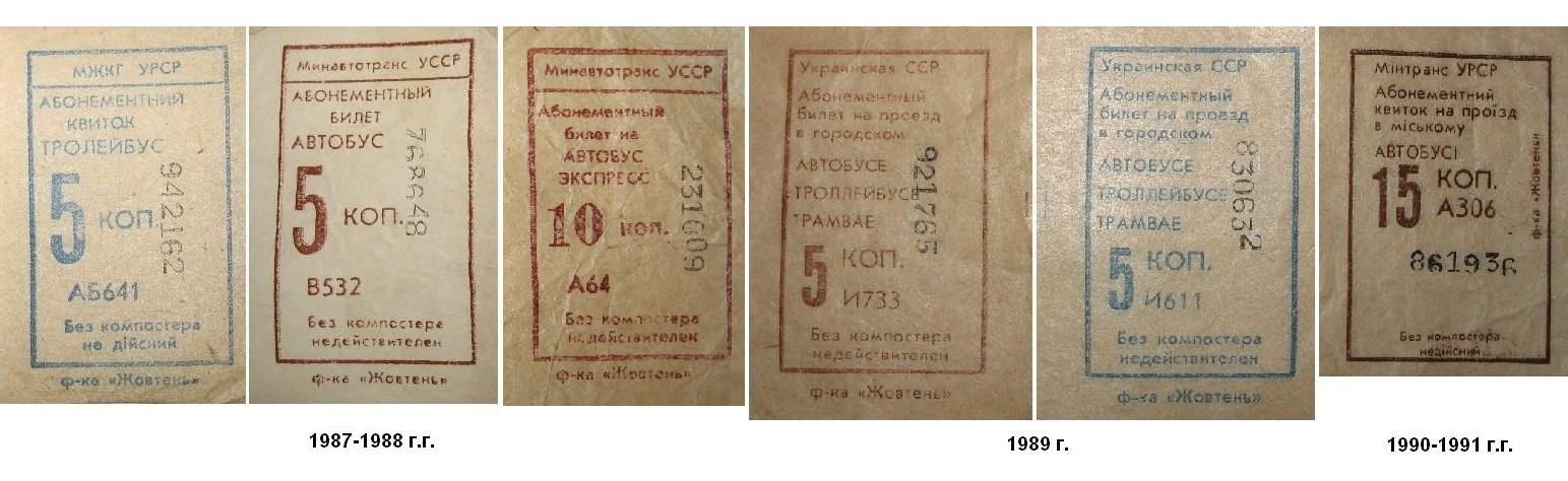 Билеты на проезд в городском транспорте Лисичанска (во время СССР)